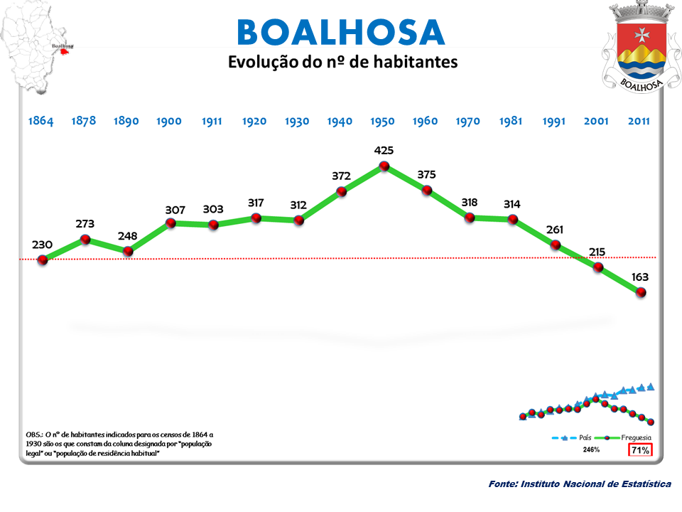 Censos 1864/2011